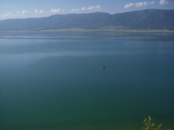 Озеро Чагытай в Туве